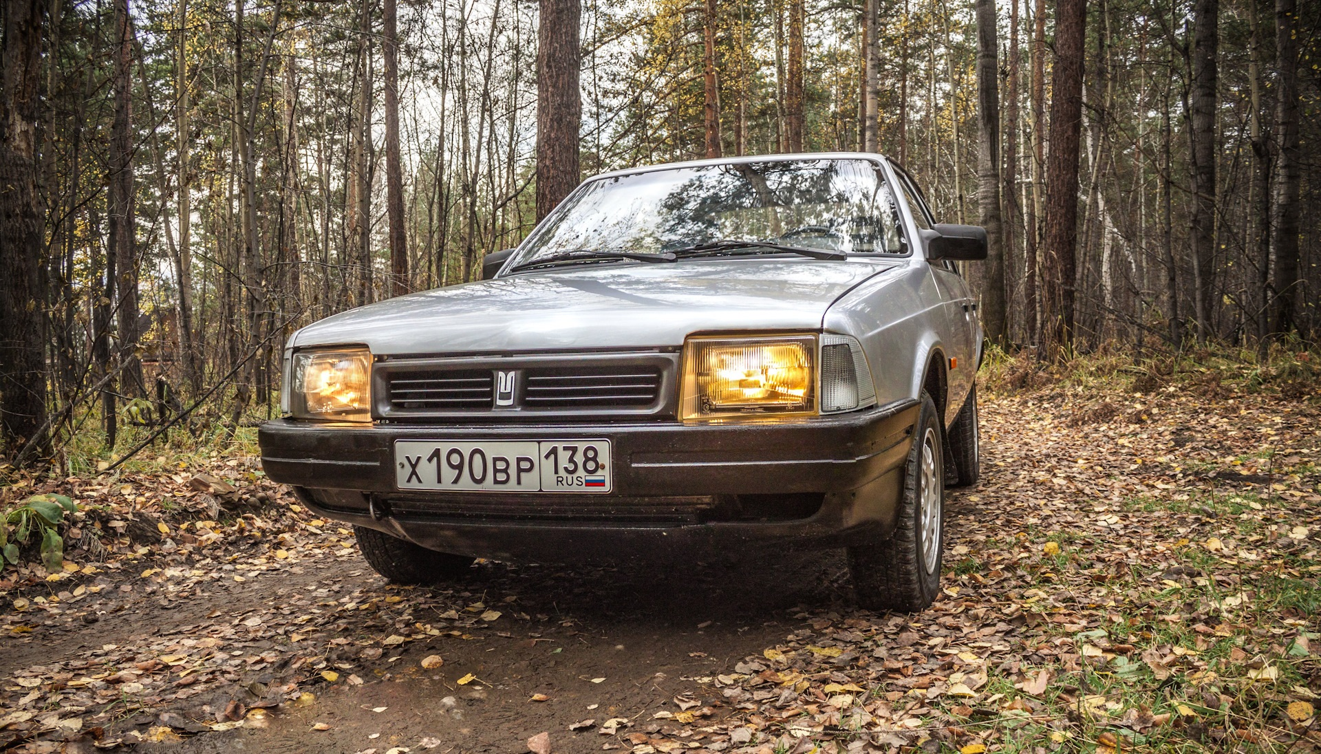 Один из сохранившихся экземпляров модели «АЗЛК-2142», находящийся в Иркутске. Принадлежит местному коллекционеру и реставратору автомобилей производства «МЗМА»/«АЗЛК».